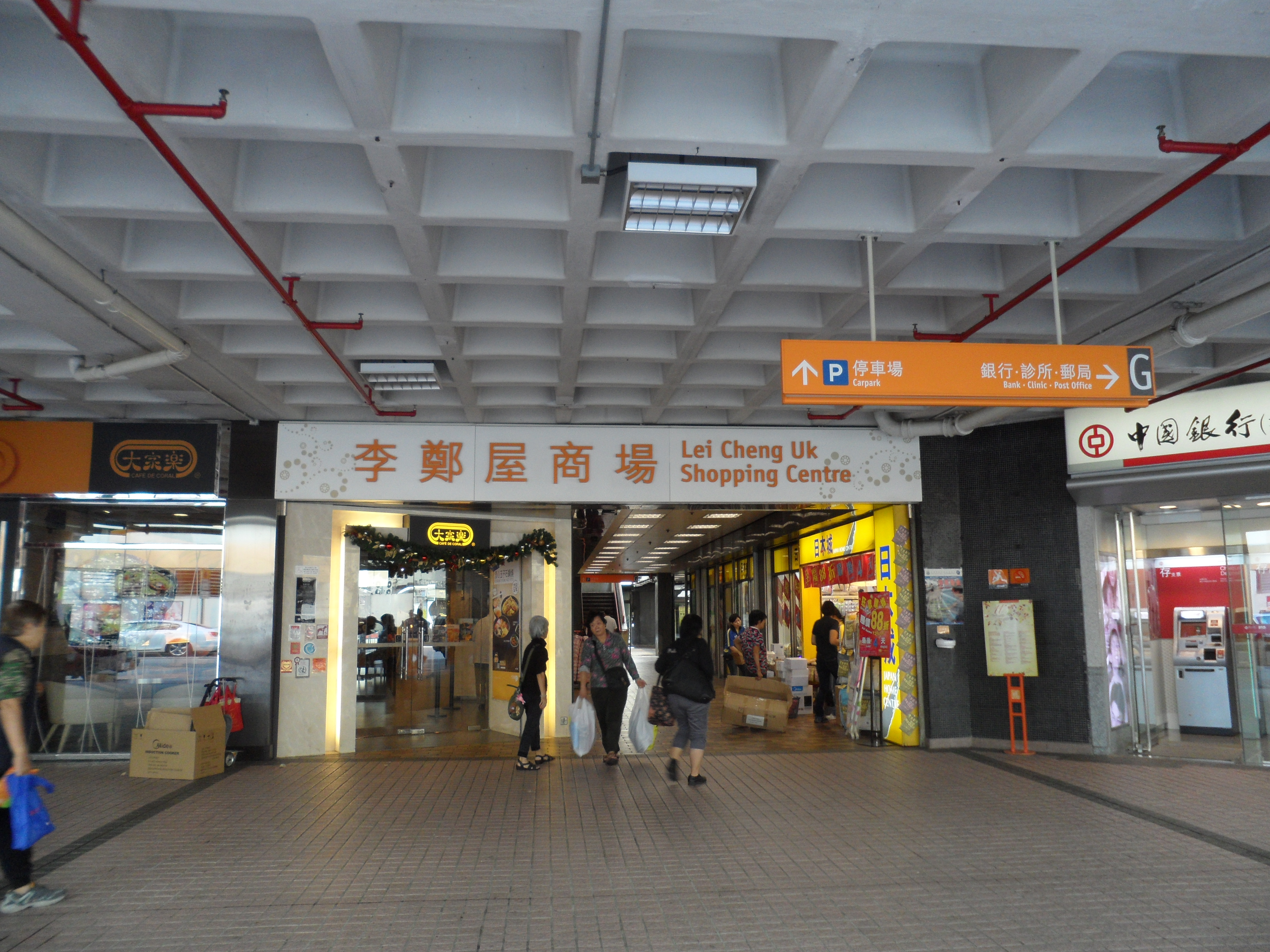 李鄭屋邨商場，位於信義樓地下